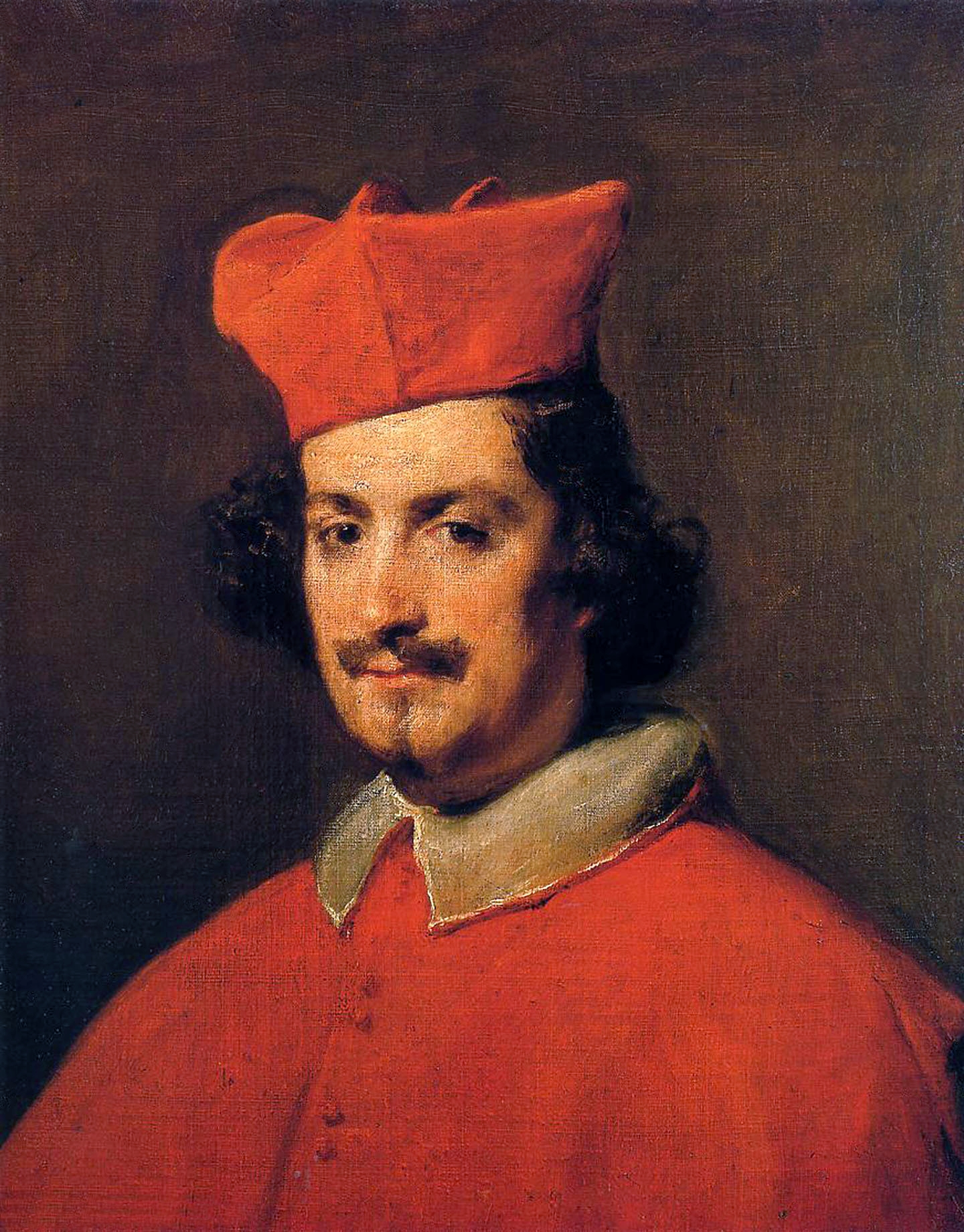 Retrat del cardenal Camillo Astalli Pamphili. Nova York, Hispanic Society